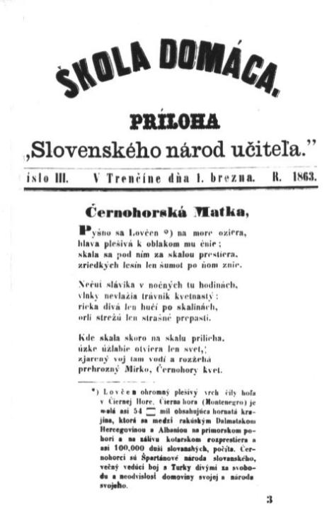 Titulný list periodika Škola domáca, ktoré vychádzalo na Slovensku v druhej polovici 19. storočia.